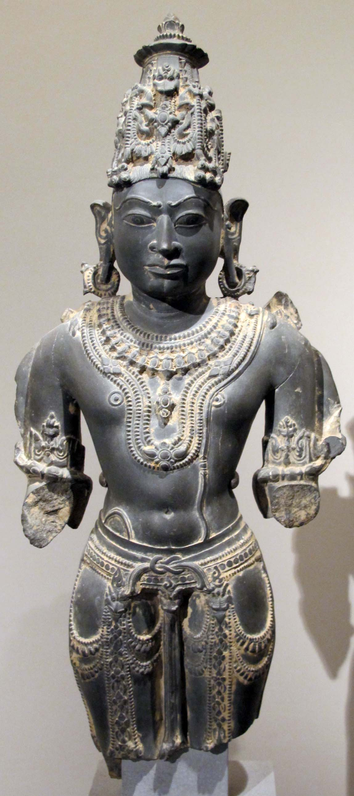 Madhya pradesh, vishnu, regione di gwalior, xi-xii sec